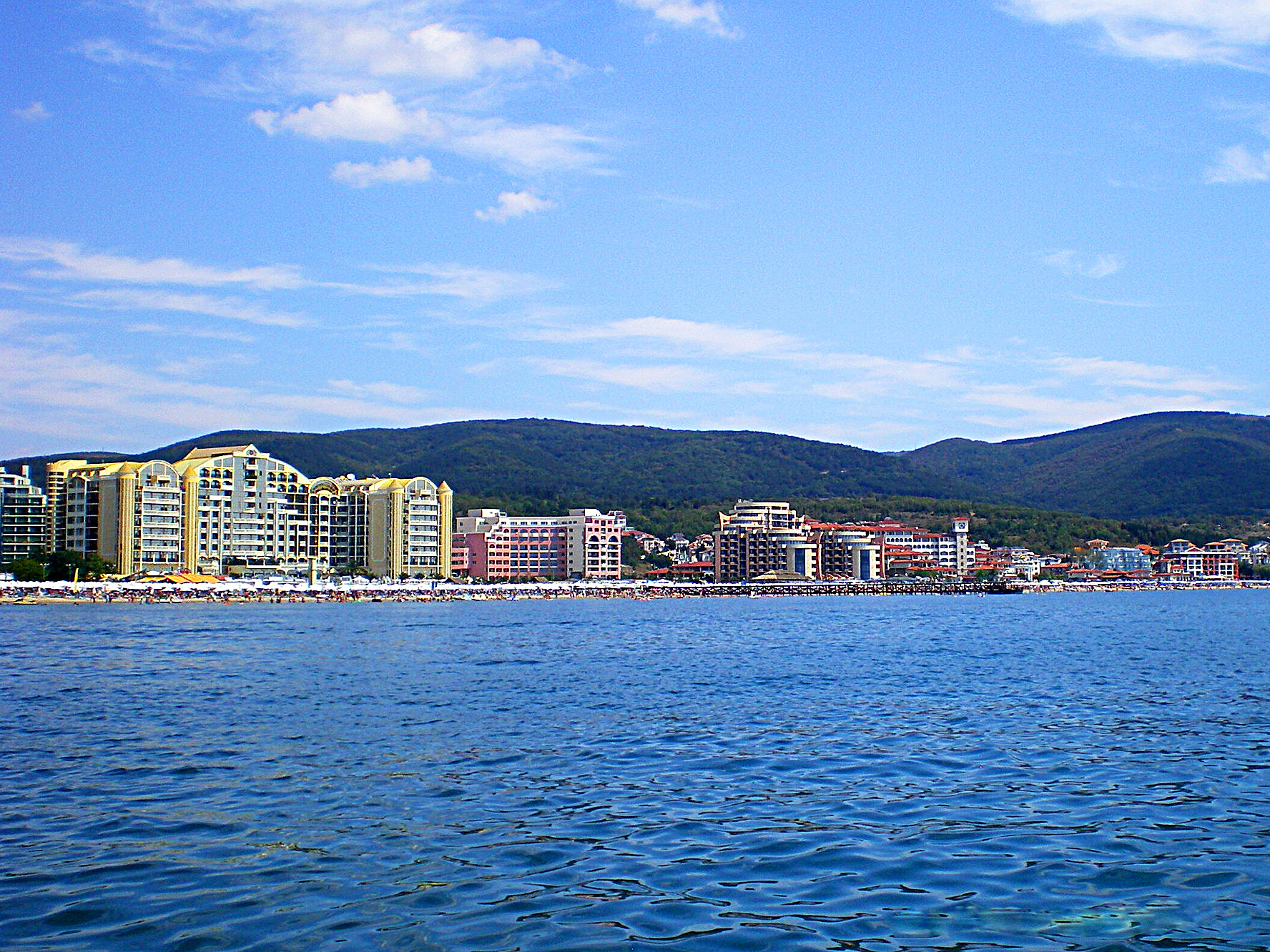 Болгария. Солнечный берег. Север курорта.